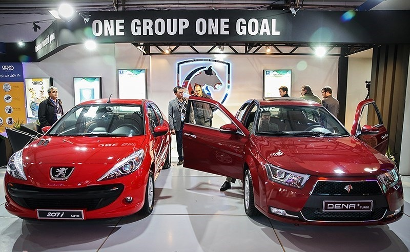 دنا پلاس و پژو ۲۰۷